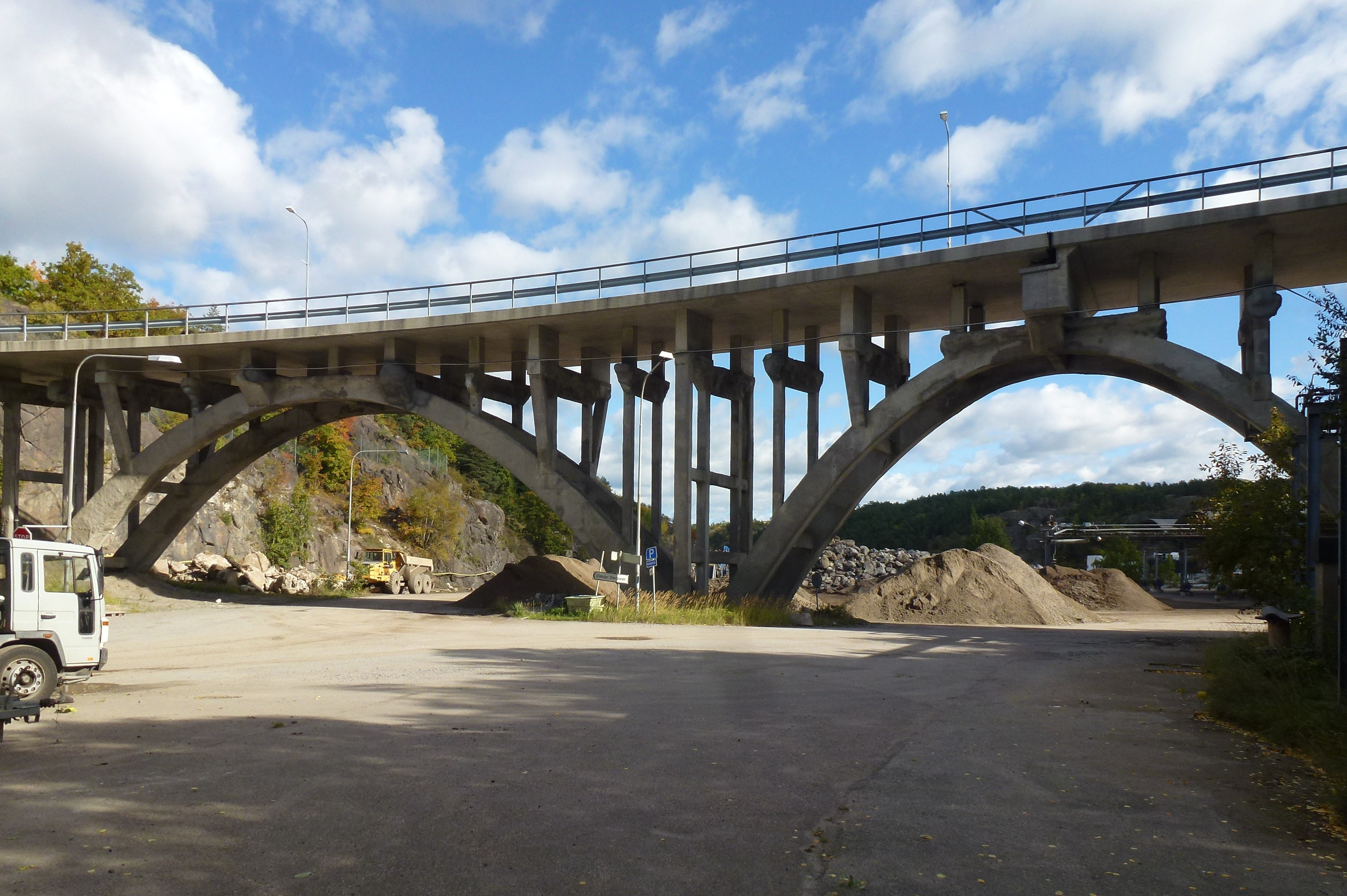 Kvarnholmsbron